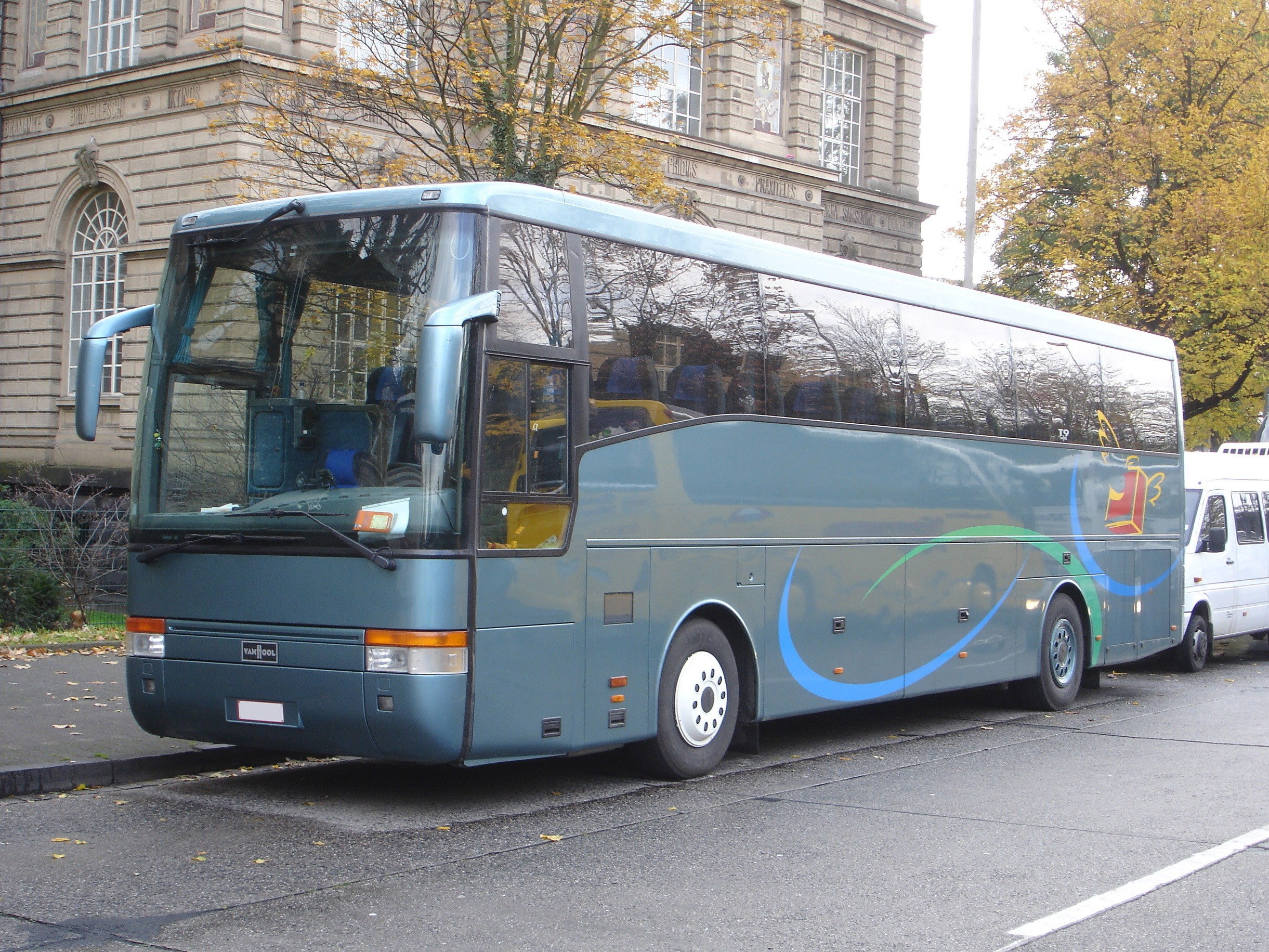 Van Hool T 915 Reisebus